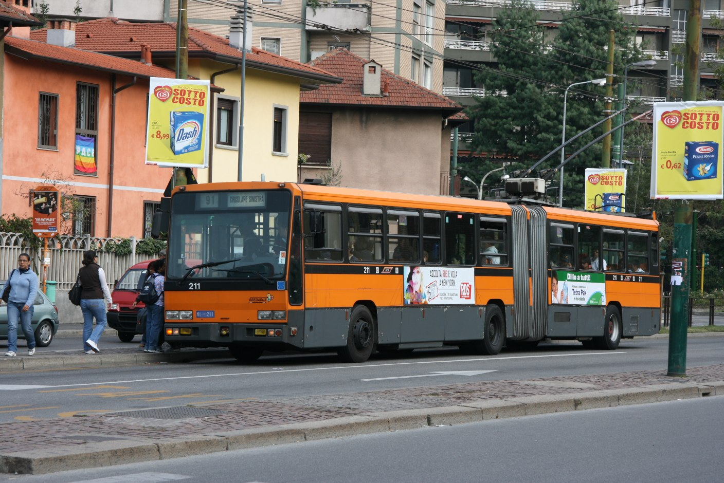 Vettura filoviaria 211 dell'ATM di Milano in viale Nazario Sauro